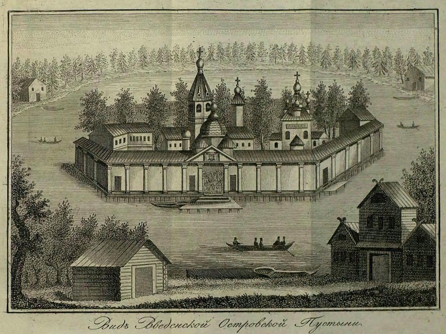 Вид Введенской островной пустыни.